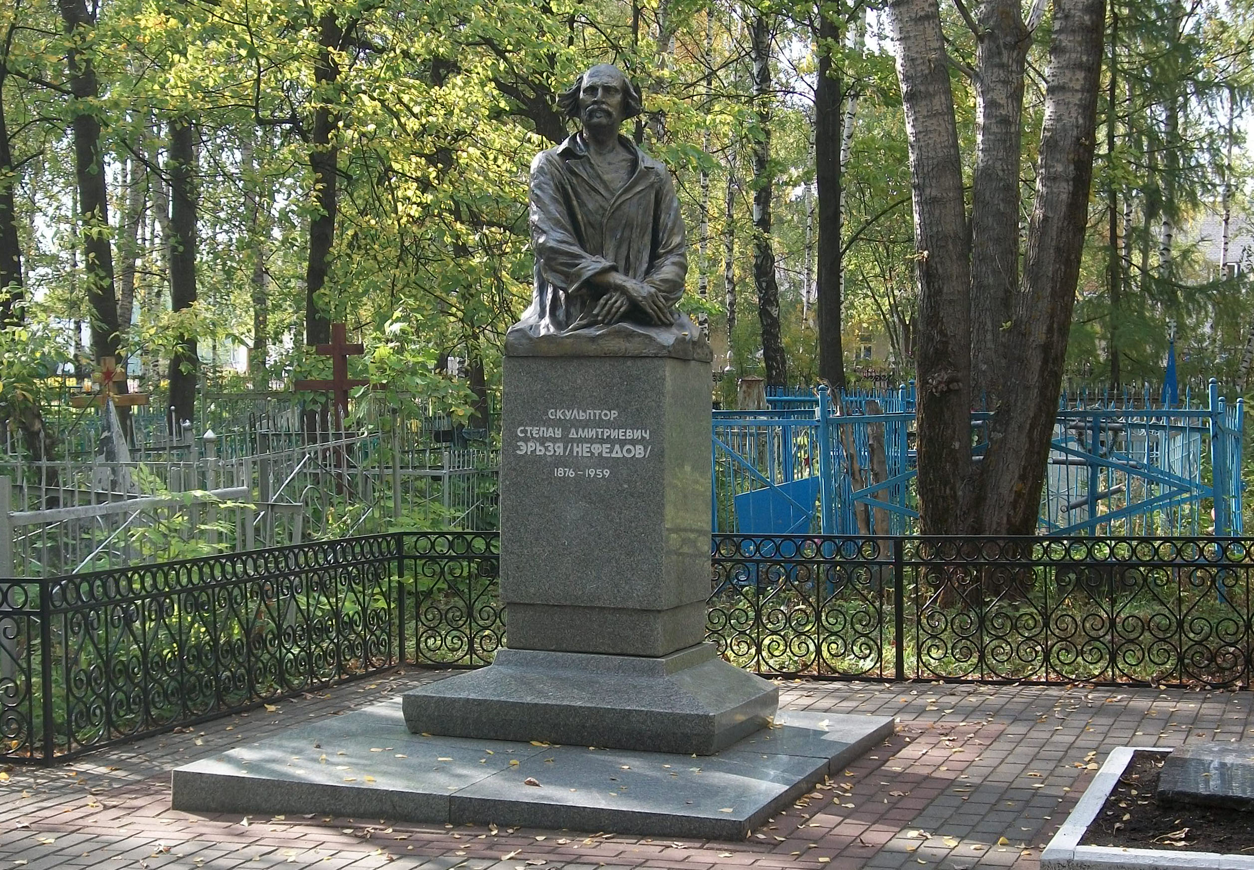 Памятник на могиле Степана Дмитриевича Эрьзи. Мемориальное кладбище в Саранске (Мордовия)